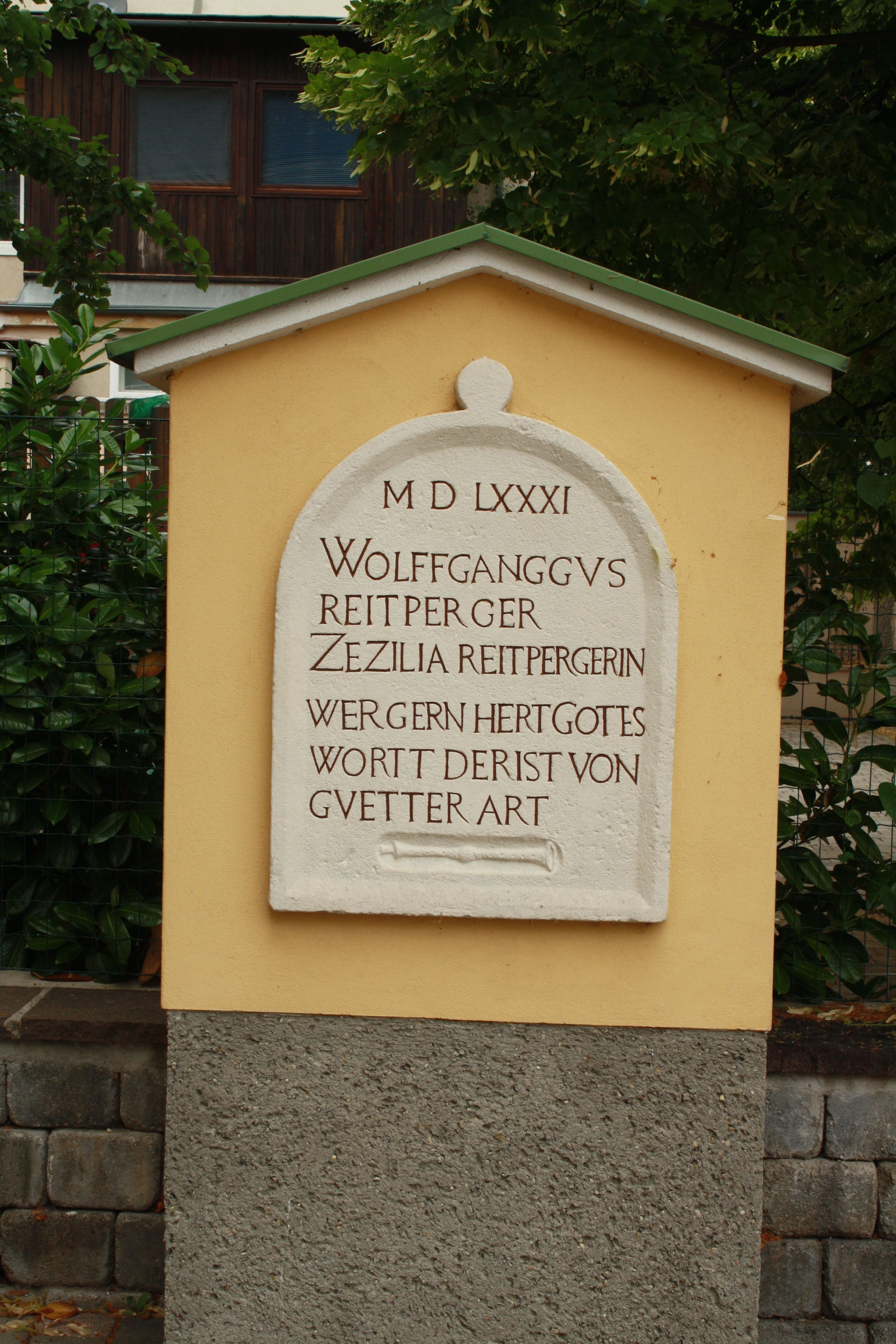 Tafel des Protestantensteins bei der Evangelische Kirche in Mödling